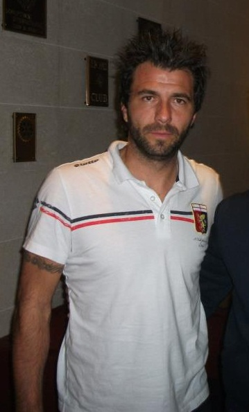 Sebastian Frey, giocatore del Genoa, all'NH Excelsior di Siena il 3 novembre 2012, il giorno prima della partita Siena-Genoa (11a giornata, Serie A 2012/13).